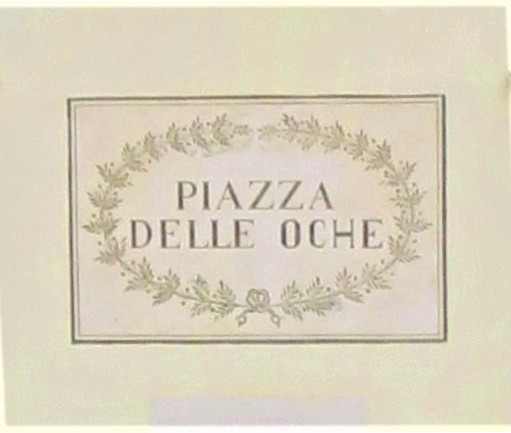 Piazza Battisti Rovereto. Indicazione dell'antica Piazza delle Oche